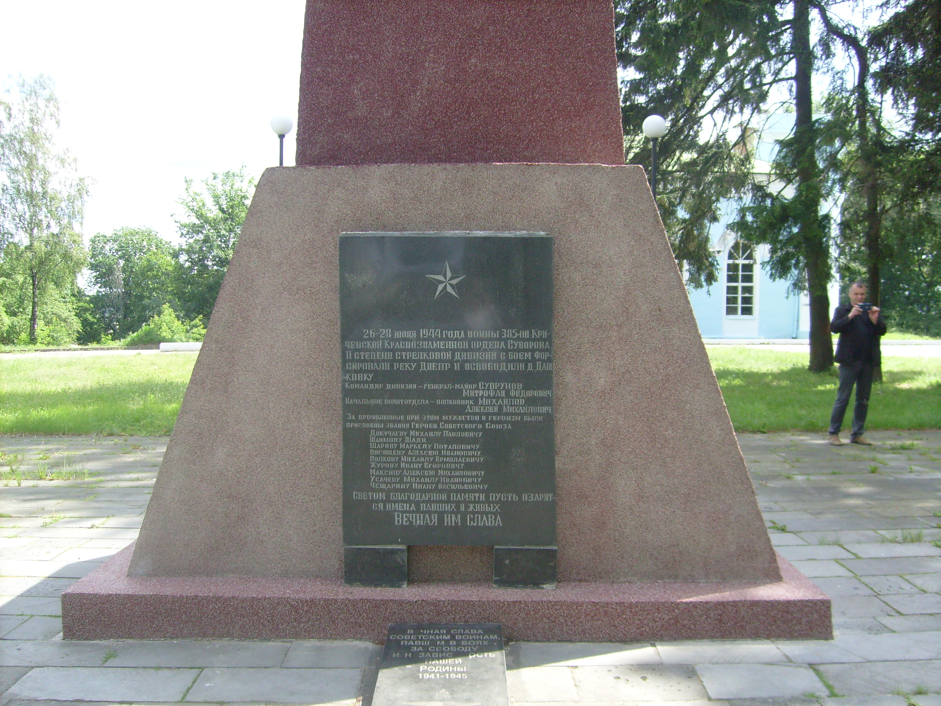 Стела в деревне Дашковка